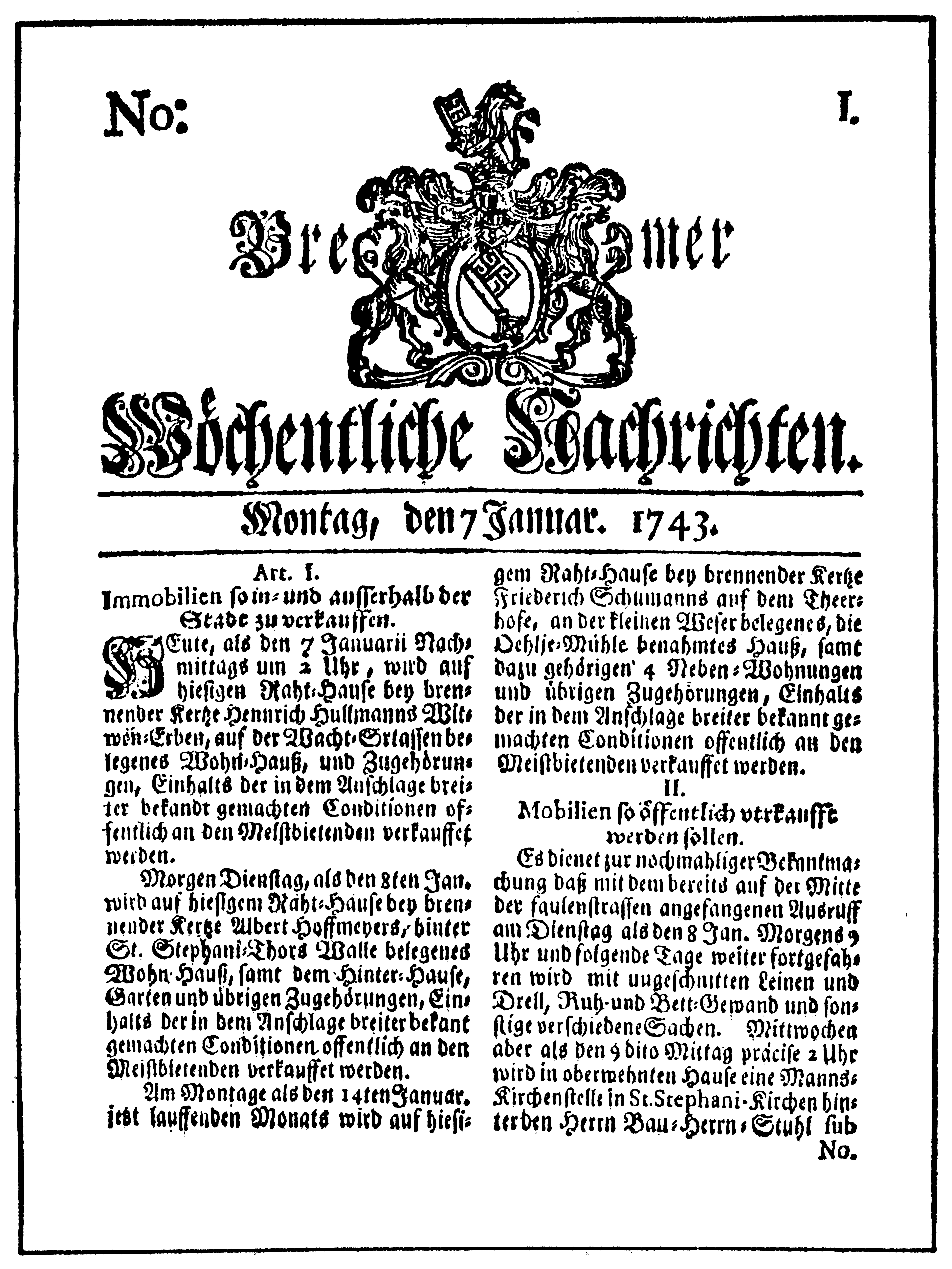 Dies ist die erste Ausgabe der Bremer Wöchentlichen Nachrichten (Bremer Nachrichten)